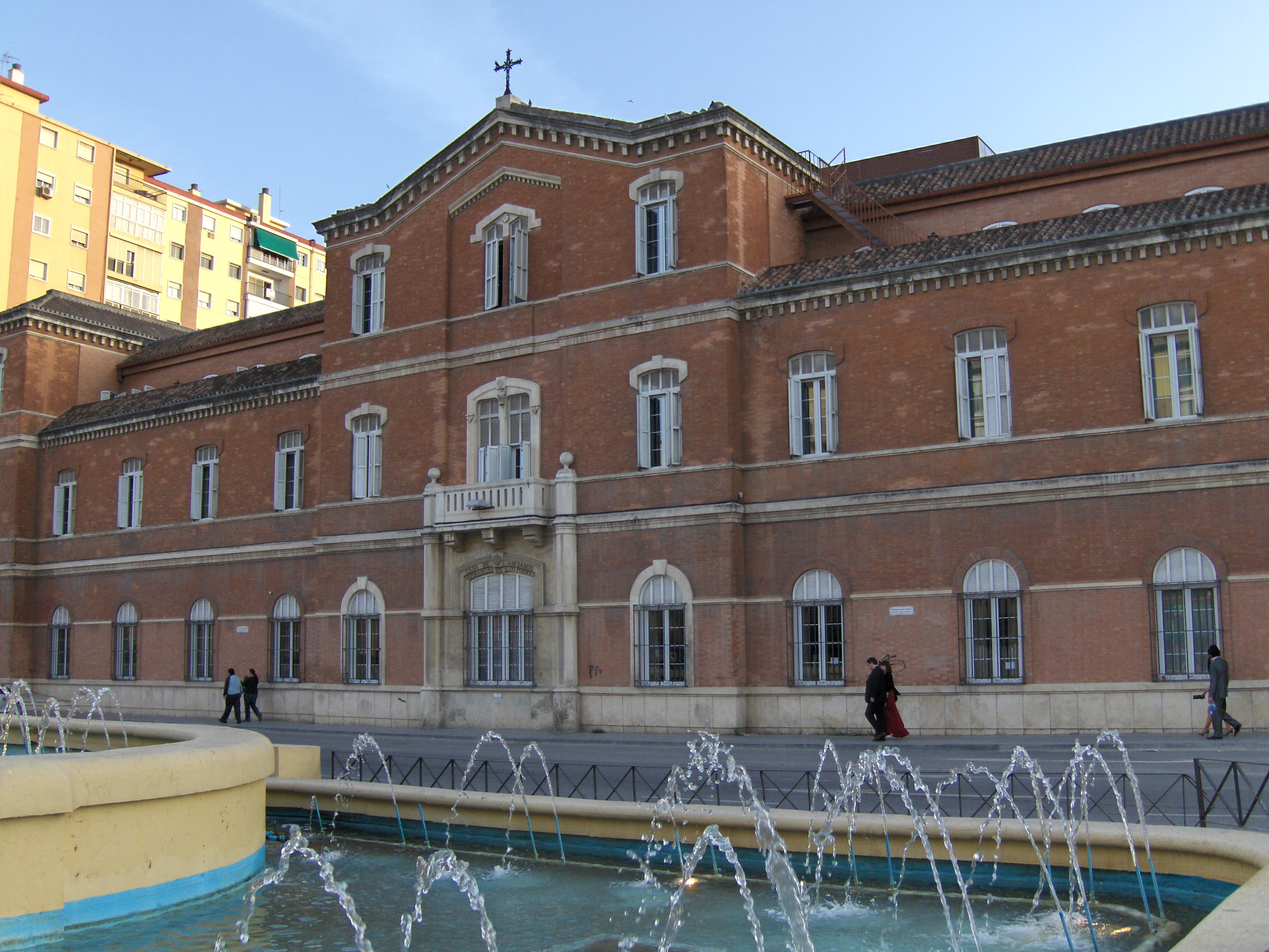 Asilo de las Hermanitas de los Pobres, Málaga, España.